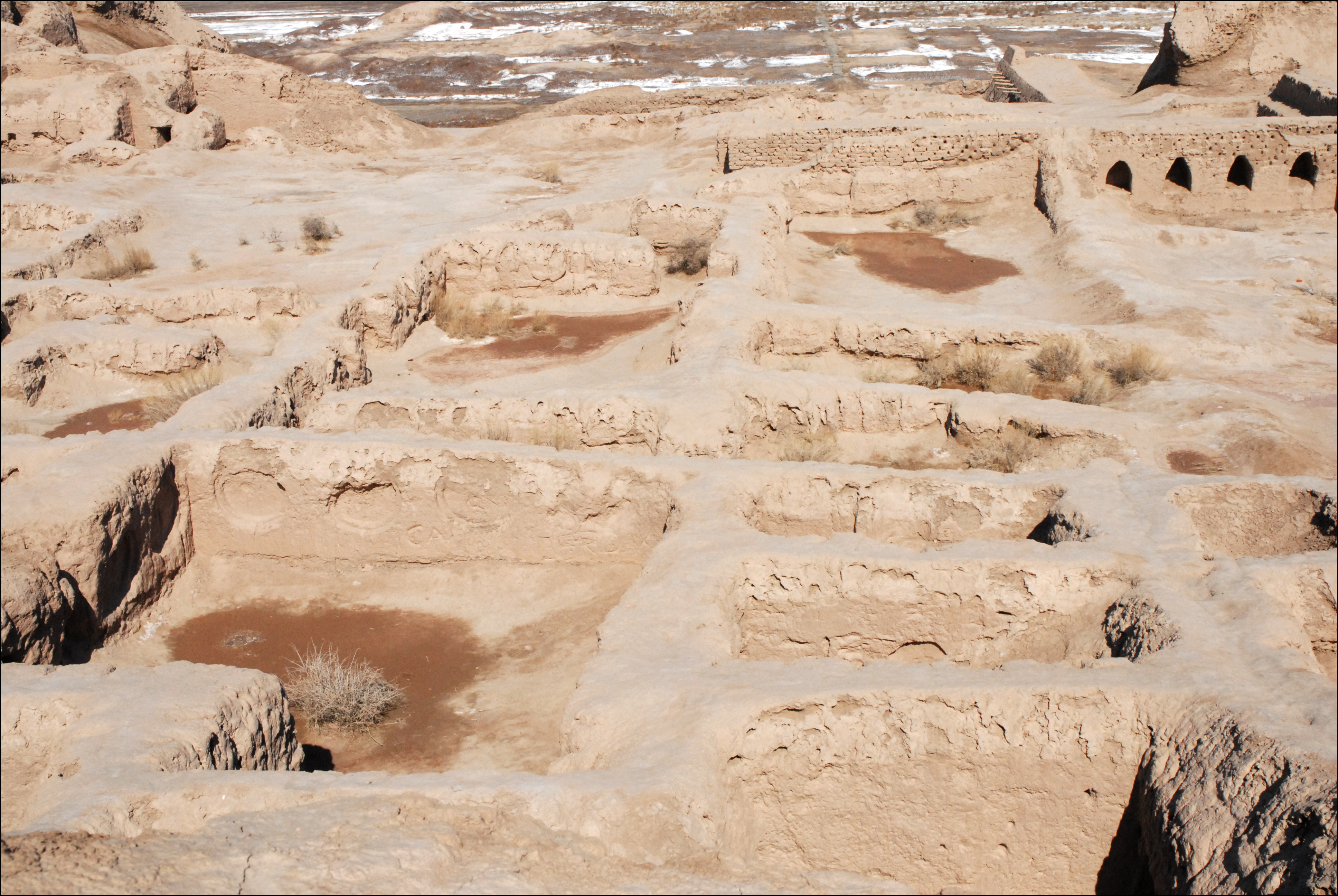 L'intérieur du palais royal de Toprak Kala. Toprak Kala dans le Khorezm (Karakalpakstan) était l'emplacement d'une ville ancienne fortifiée, construite en terre crue au sommet d'un promontoir. Tout autour se trouve le désert du Kyzyl Koum qui s'étend jusqu'à la mer d'Aral. D'autres citadelles parsemaient ce territoire, elles avaient pour but de défendre, des agressions des nomades, les populations habitant dans ce territoire autrefois fertile car irrigué grâce à des canaux détournant l'eau de l'Amou Darya. Cette ville s'est développée à partir du 1er siècle avant J.-C et a été abandonnée au 6ème siècle après J.-C. à la suite d'attaques de turcs nomades qui ont dévasté les canaux, privant d'eau ce territoire. Les fortifications de l'ancienne cité mesuraient 350 m par 500 m (à droite). La ville était dominée par une citadelle royale (au premier plan) dans laquelle ont été menées des fouilles par les archéologues soviétiques et ouzbeks dès 1938. Les objets ont été déposés au musée de l'Ermitage à St Pétersbourg. Les tâches blanches sont des remontées de sel.